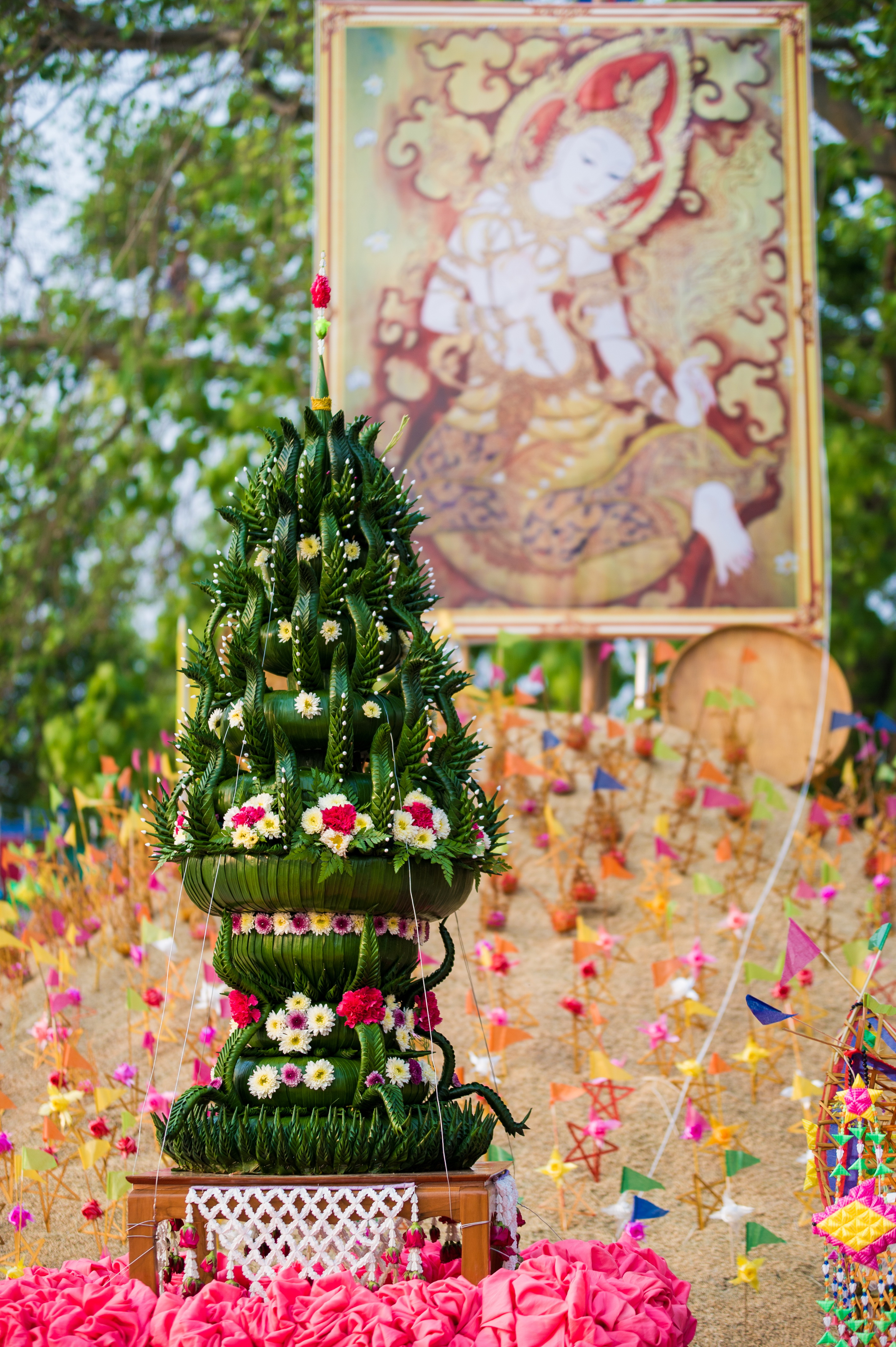 บุญกุ้มข้าวใหญ่ วัดทุ่งสนุ่นรัตนาราม